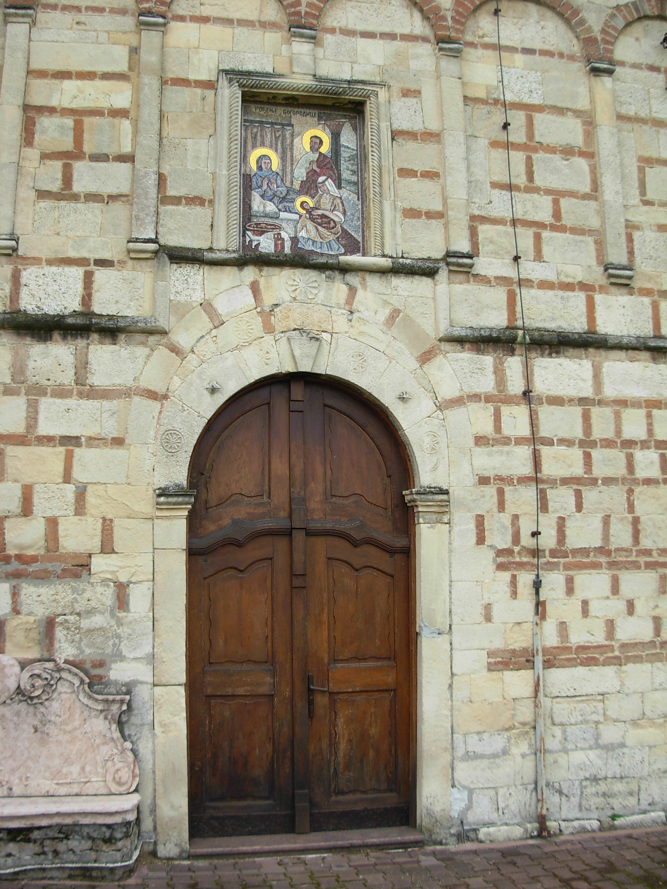 Bočni ulaz u crkvu Rođenja presvete Bogorodice u Sremskoj Kamenici.